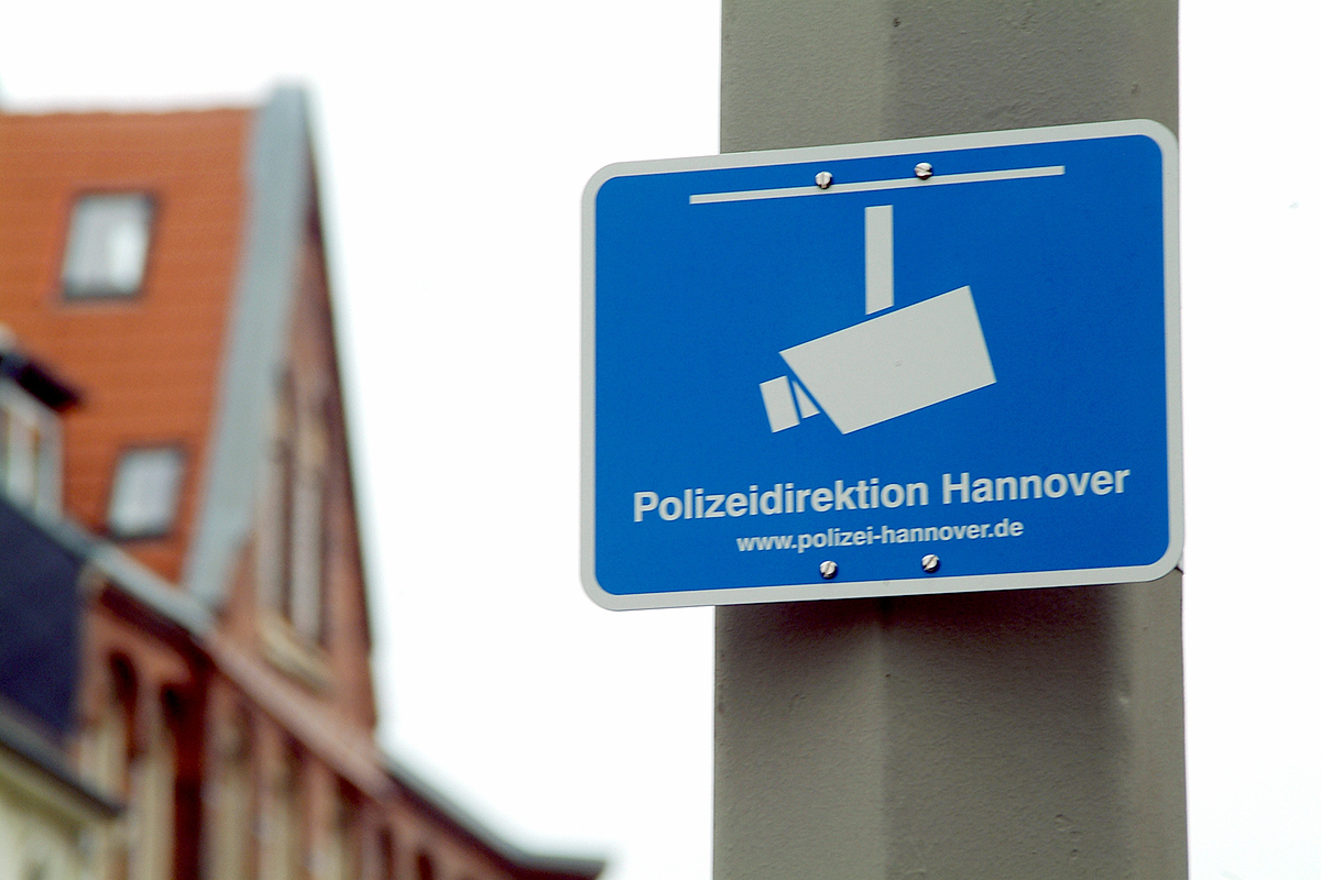 Im Zuge der Goethestraße Richtung Steintor macht dieses Schild der Polizeidirektion Hannover auf die Videoüberwachung des Bereiches hin. Näheres unter ...